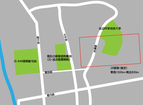 Yanji01